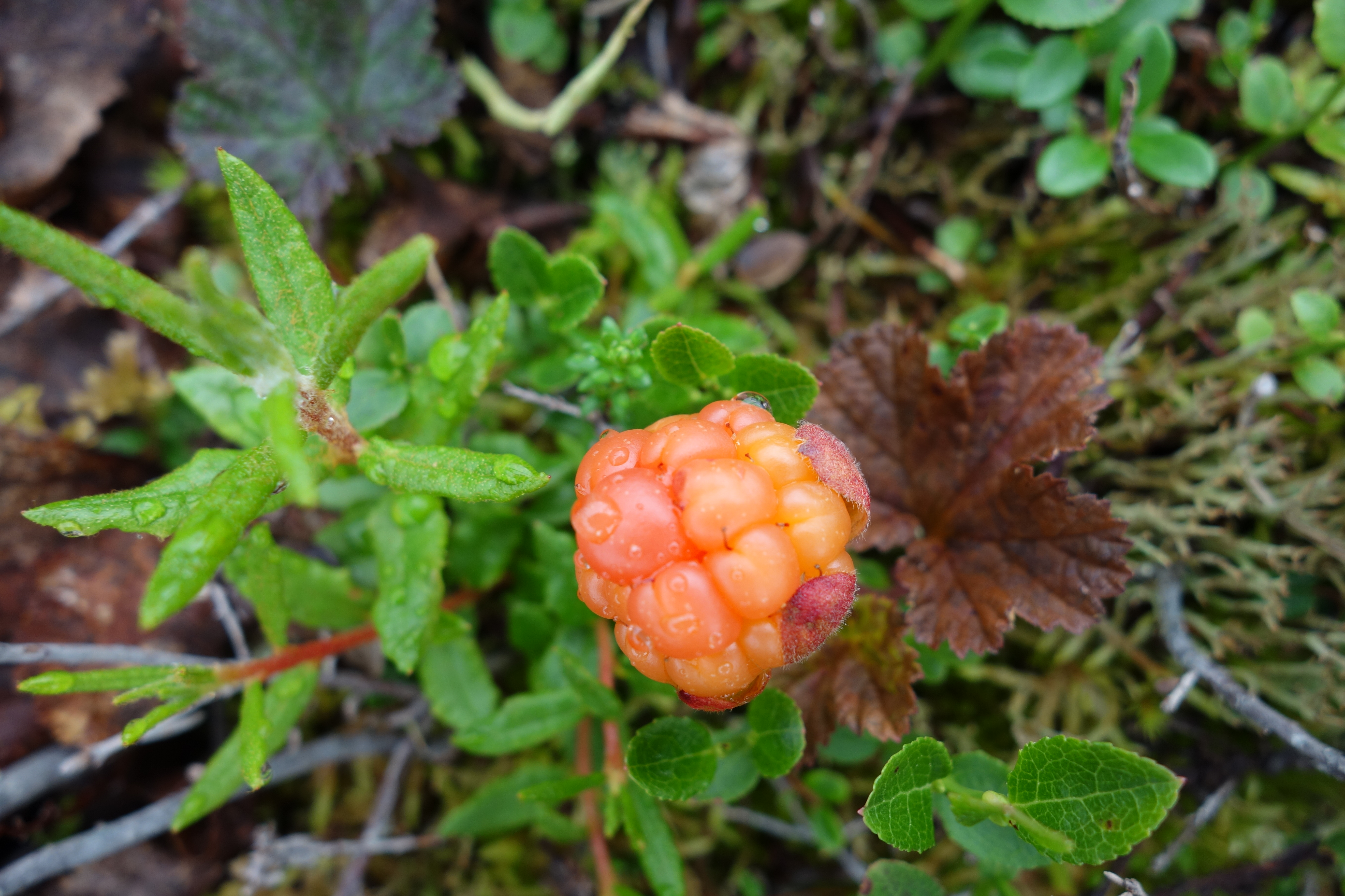 Detail na plod ostružiníku morušky